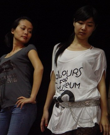 Lê Khánh và Hồng Ánh trước một vở kịch